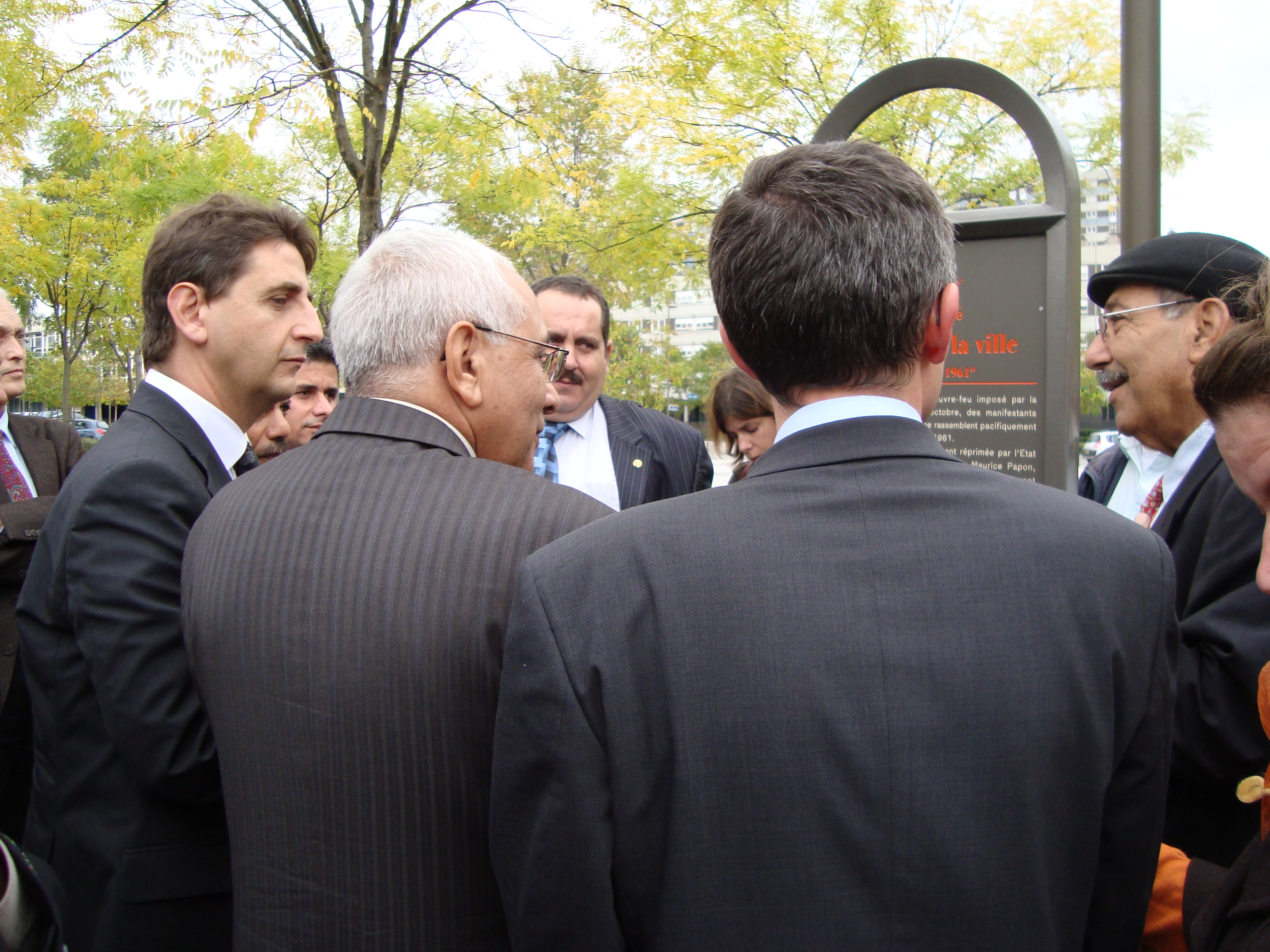 Visite d'une délégation de députés algériens en France à La Courneuve.